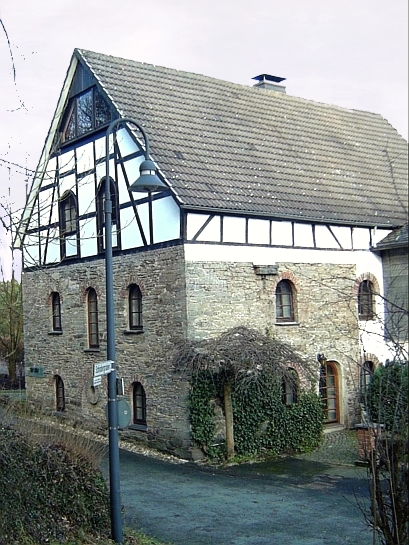 Kunsthaus Alte Mühle in Schmallenberg, Germany.